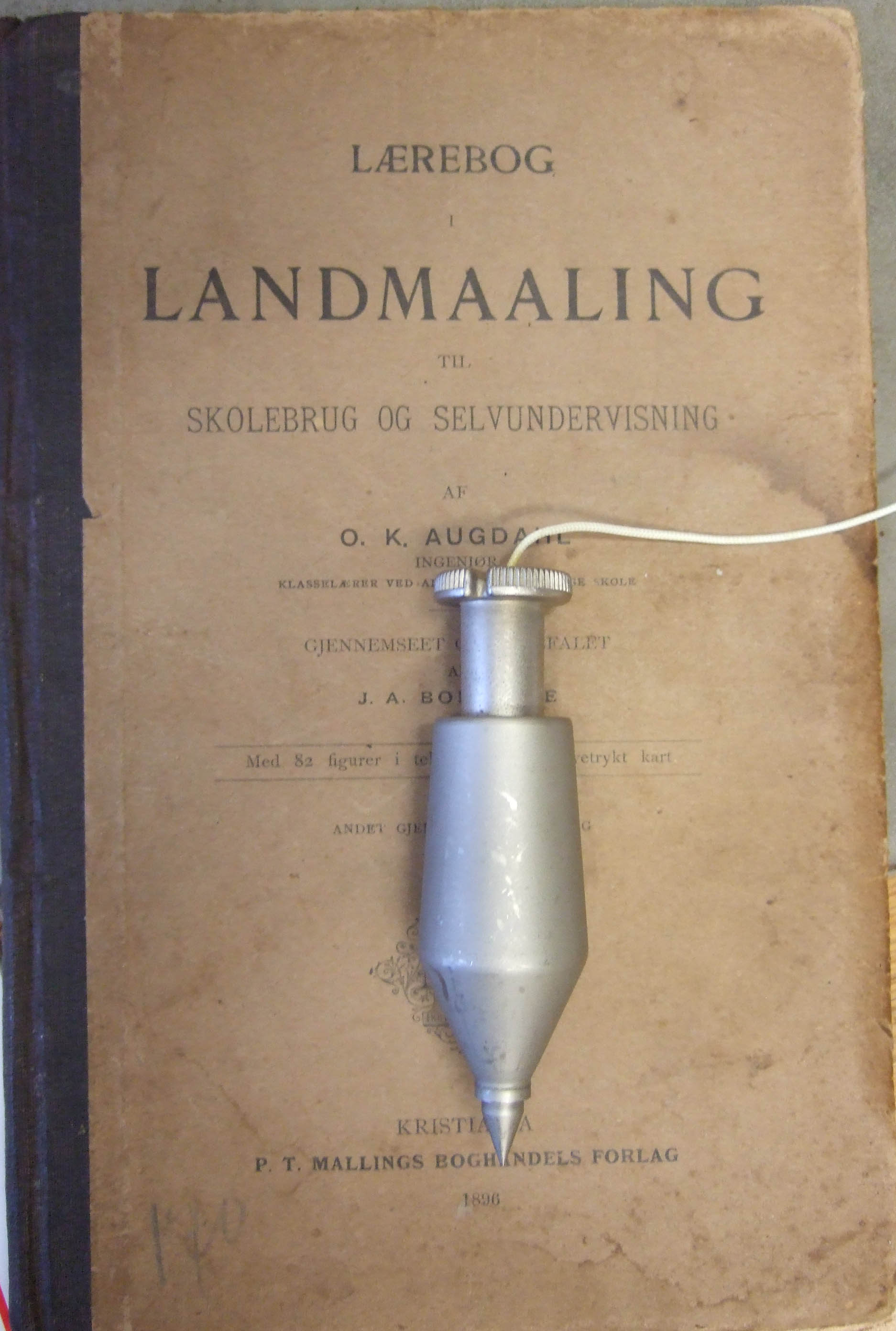 Loddsnor , lodd